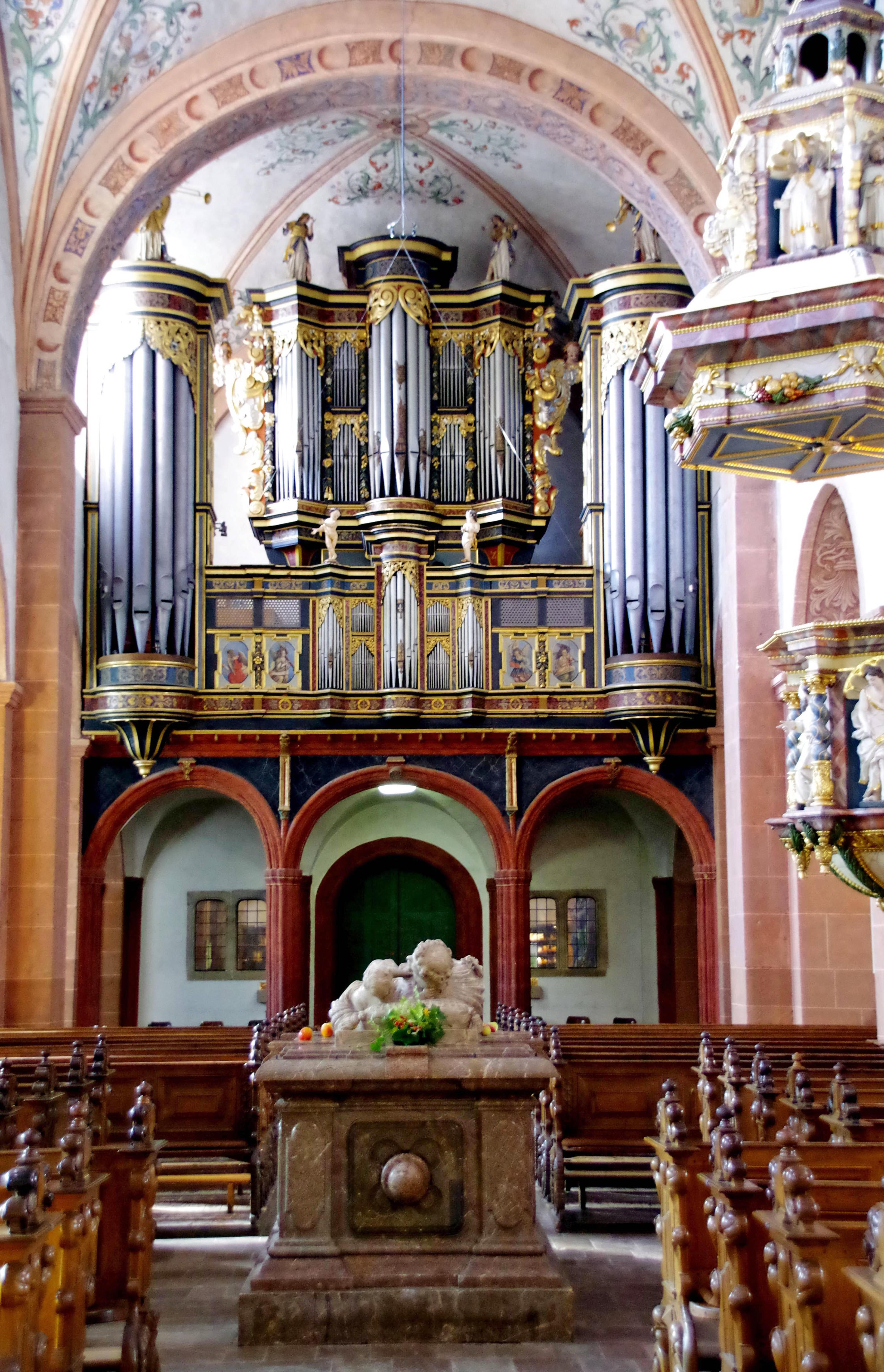 Königorgel Steinfeld mit Sarkophag